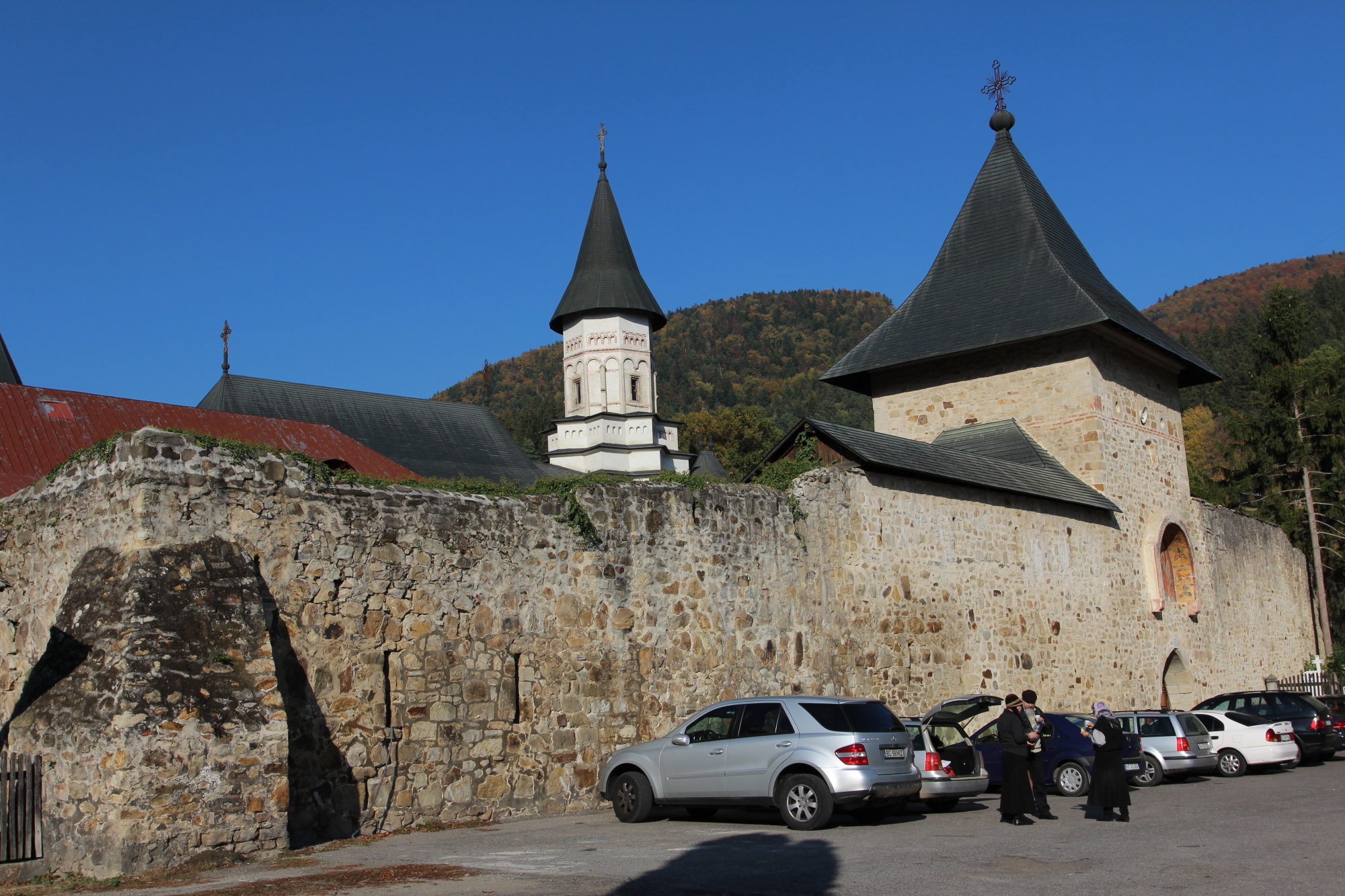 Zid de incintă 09